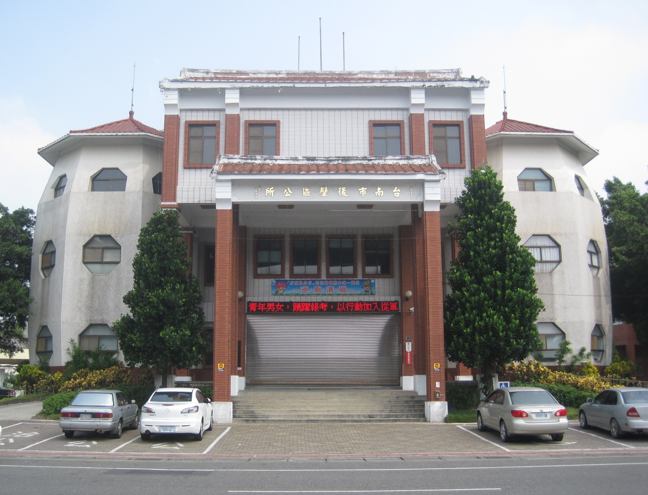 臺南市後壁區公所